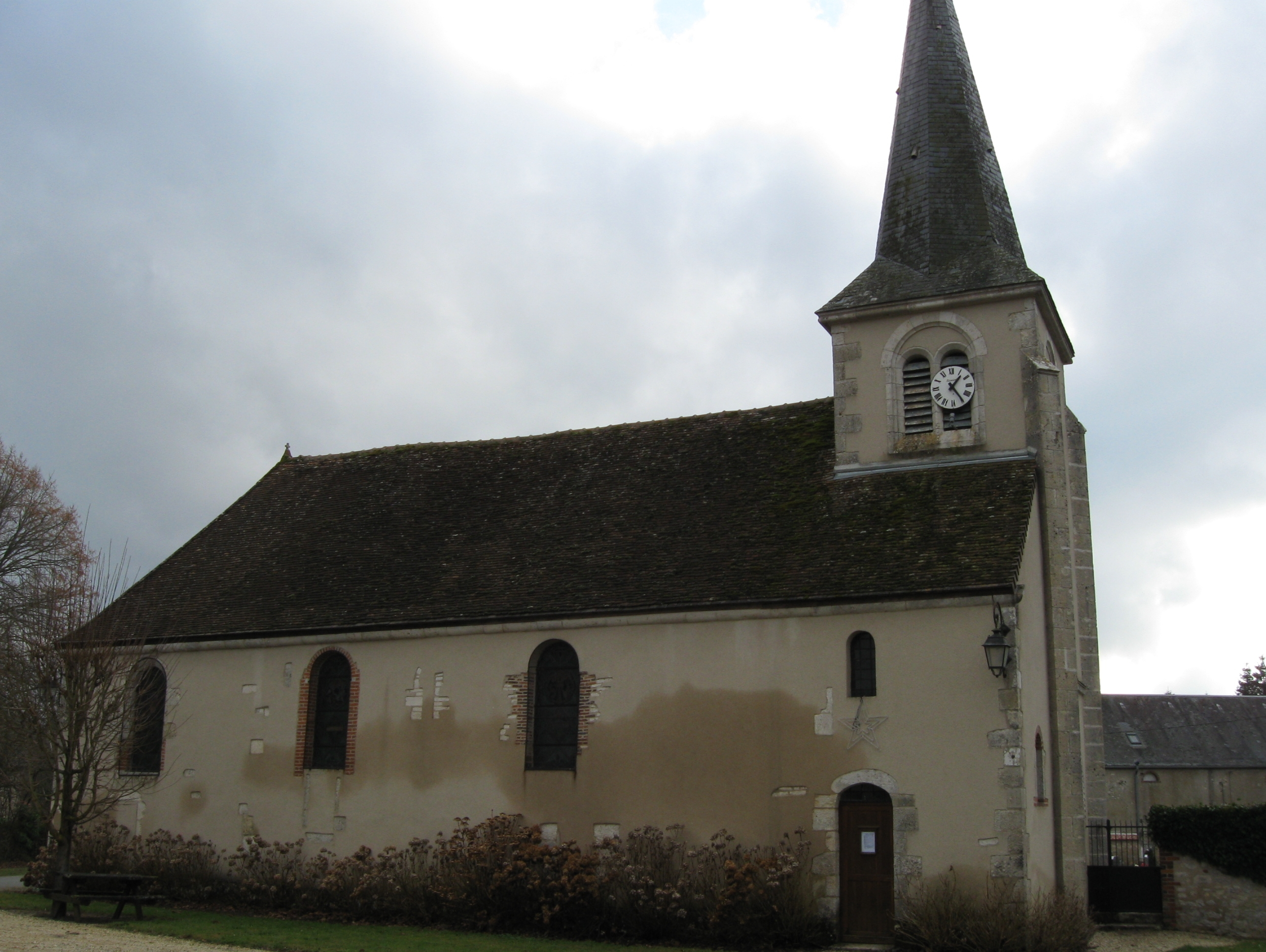 Escrignelles, l'église.